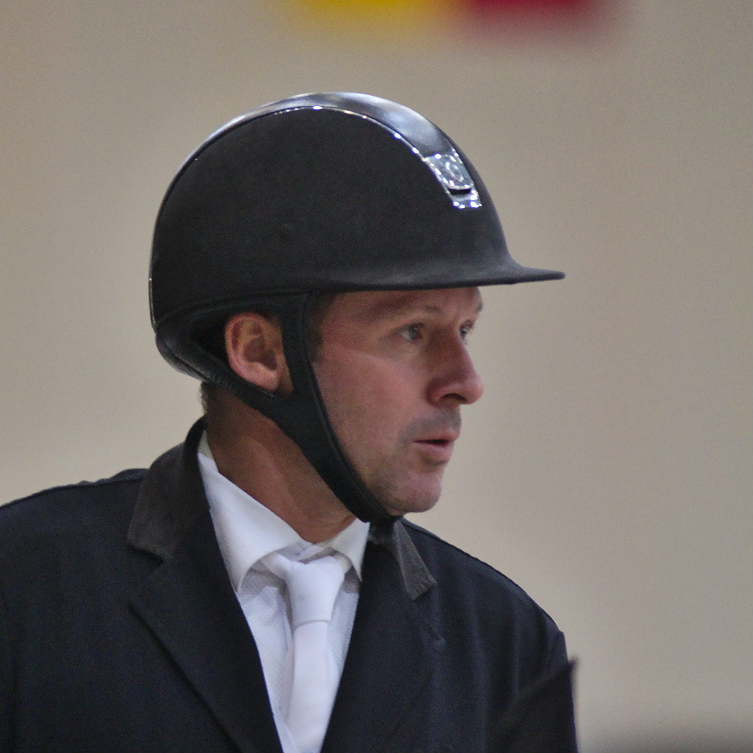 CHI Genève 2013 - 20131214 - Eric Lamaze et Zigali PS